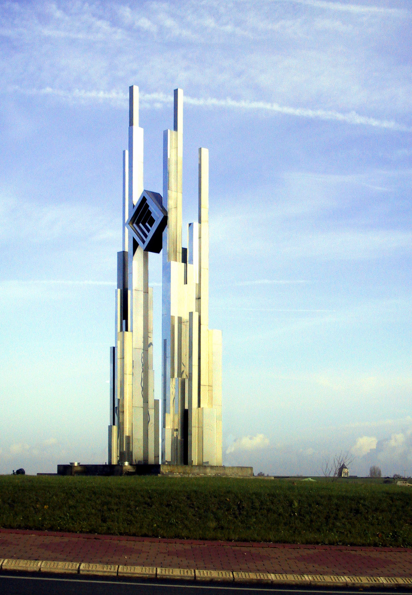 en acier inox